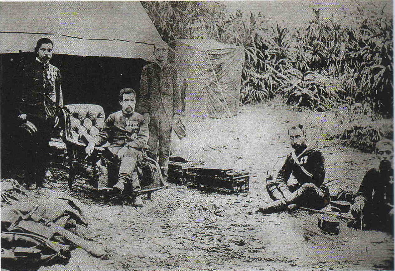 日本の皇族であった北白川宮能久が台湾の澳底に上陸して野営している様子を撮影したもの。